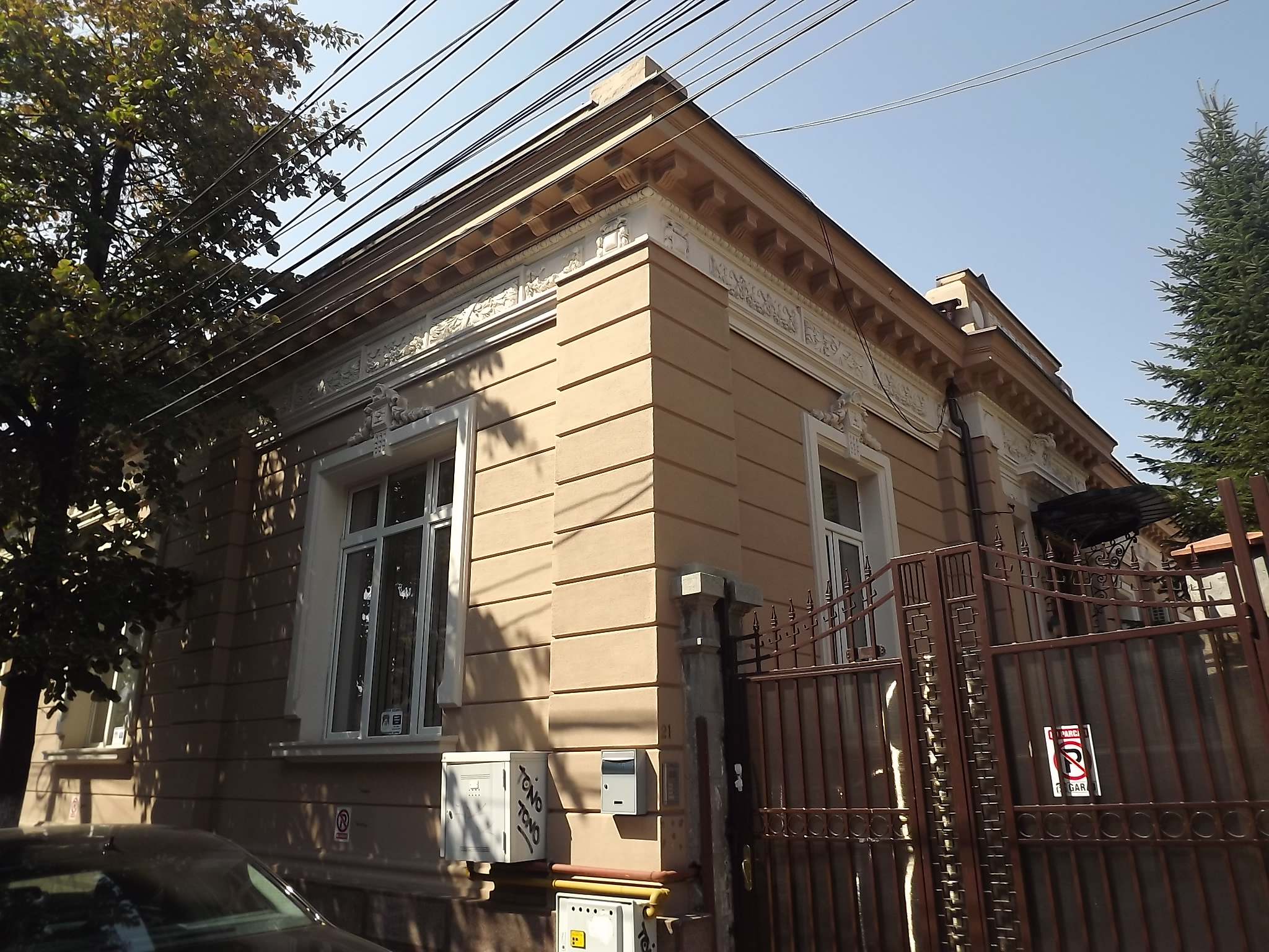 Casăui